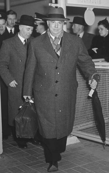 H.M. Cochran [lid van de Commissie van Goede Diensten van de VN] per KLM naar Parijs